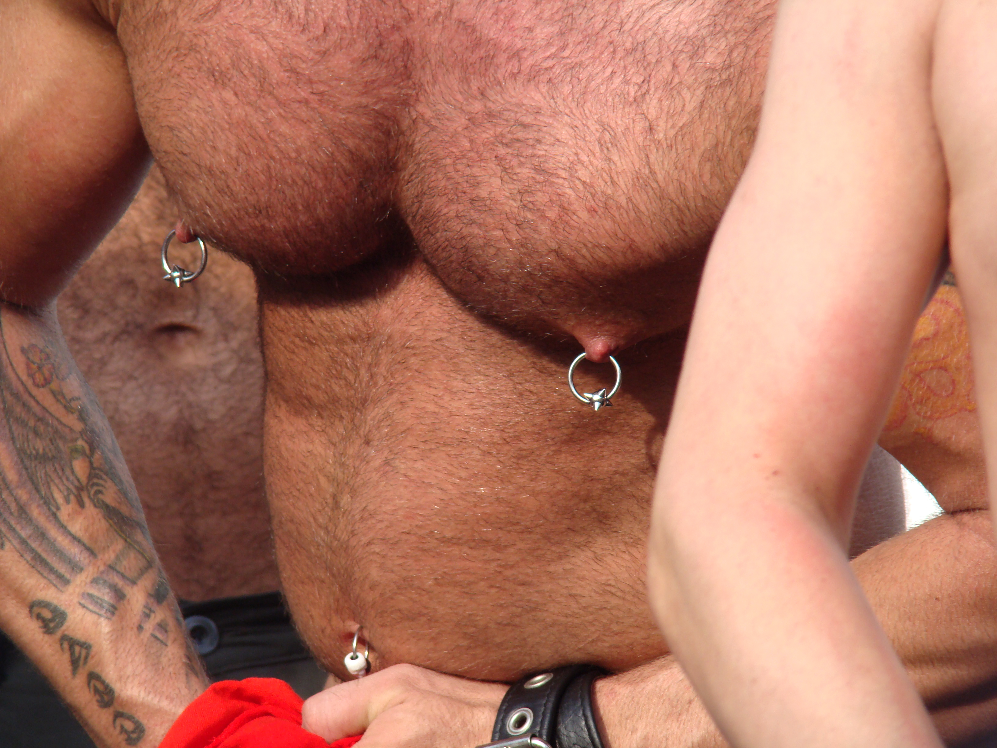 Tober Brandt's chest.